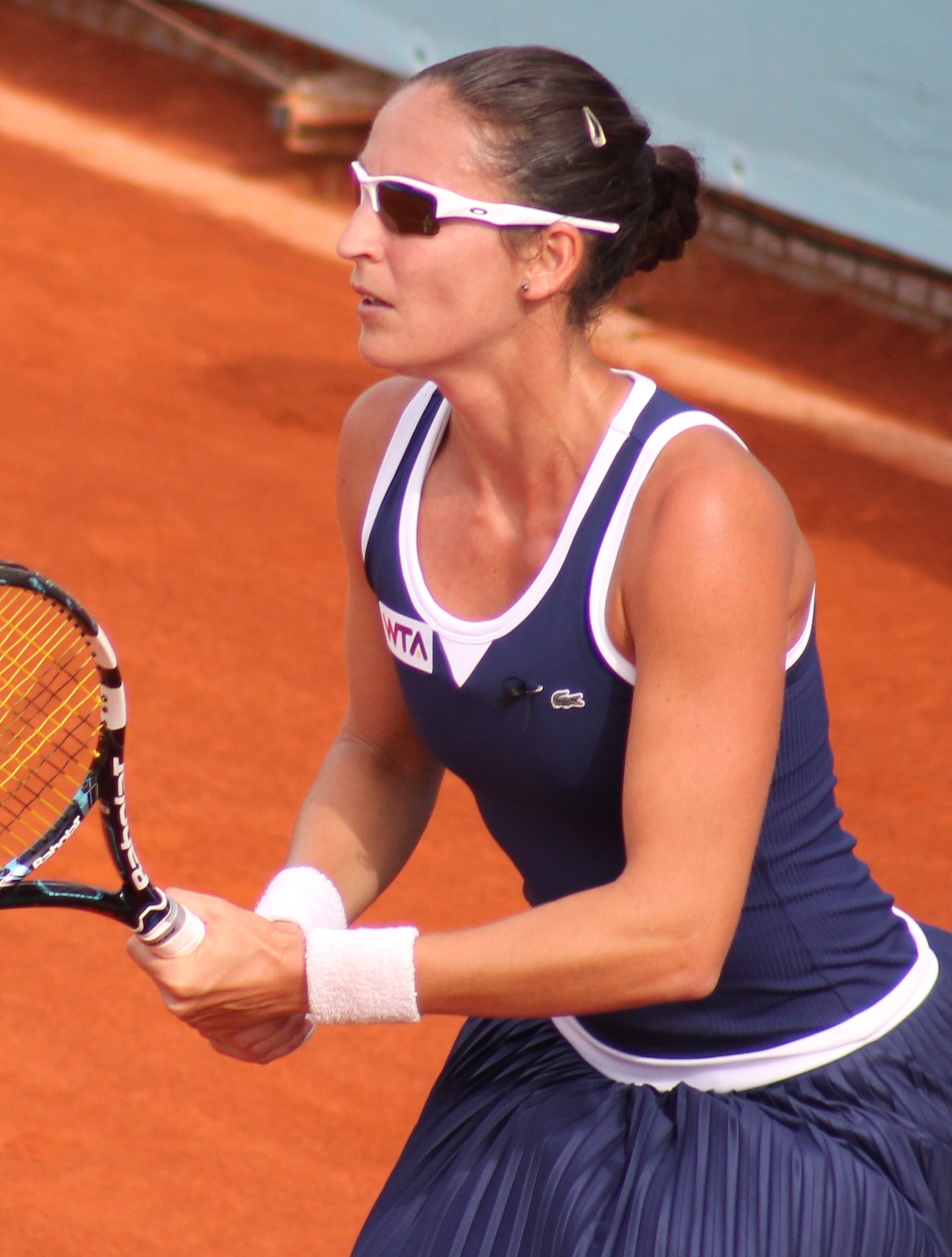 Parra Santonja MA14 (10)